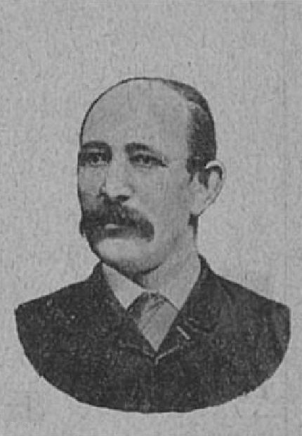 Jan Kelbl (1847-1928), rakouský politik z Moravy; poslanec Moravského zemského sněmu